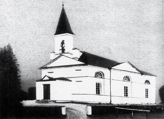 Кирха прихода Ропсу в деревне Малые Горки.